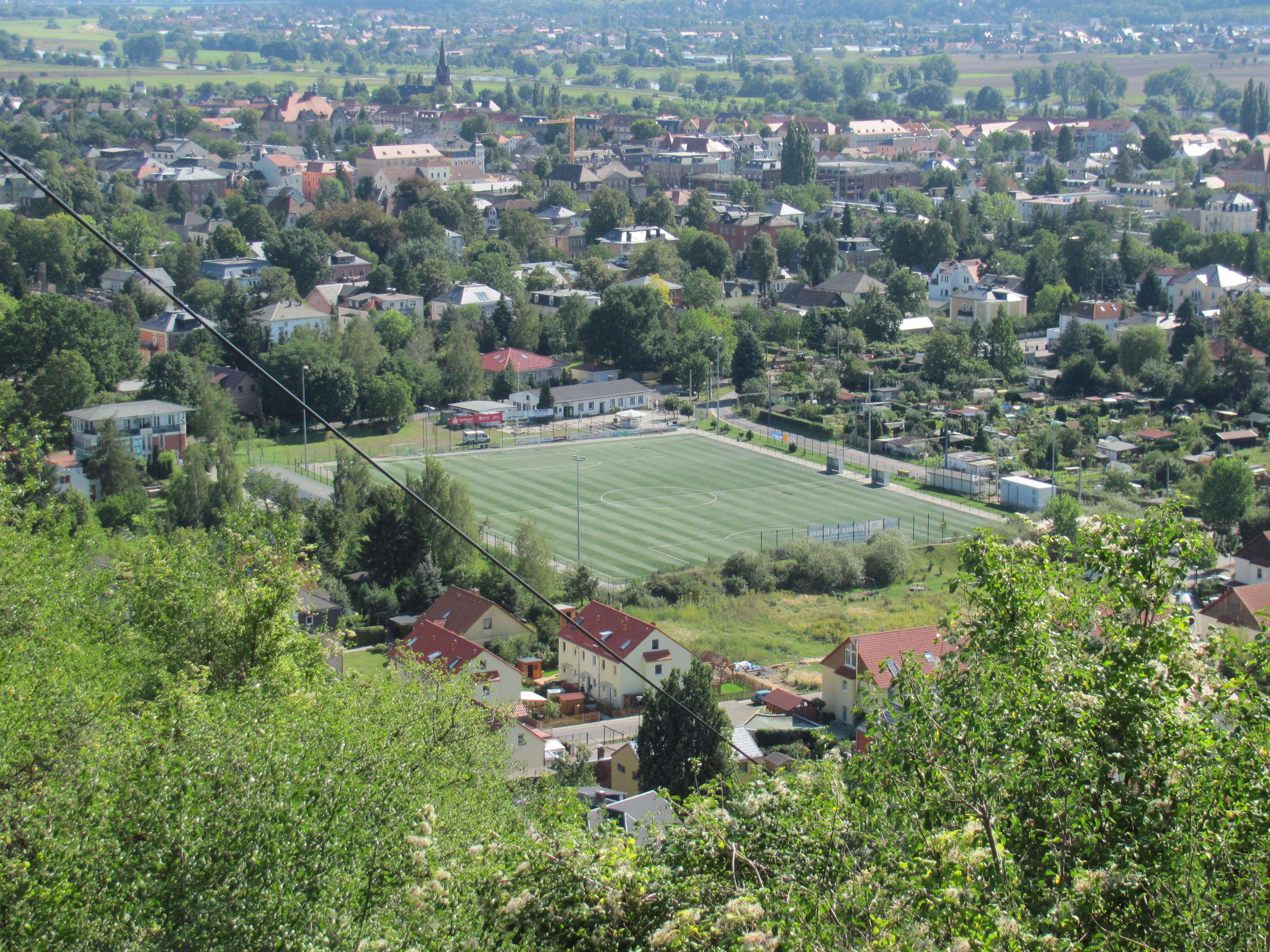 Radebeul Weinbergstadion, von der Sternwarte aus